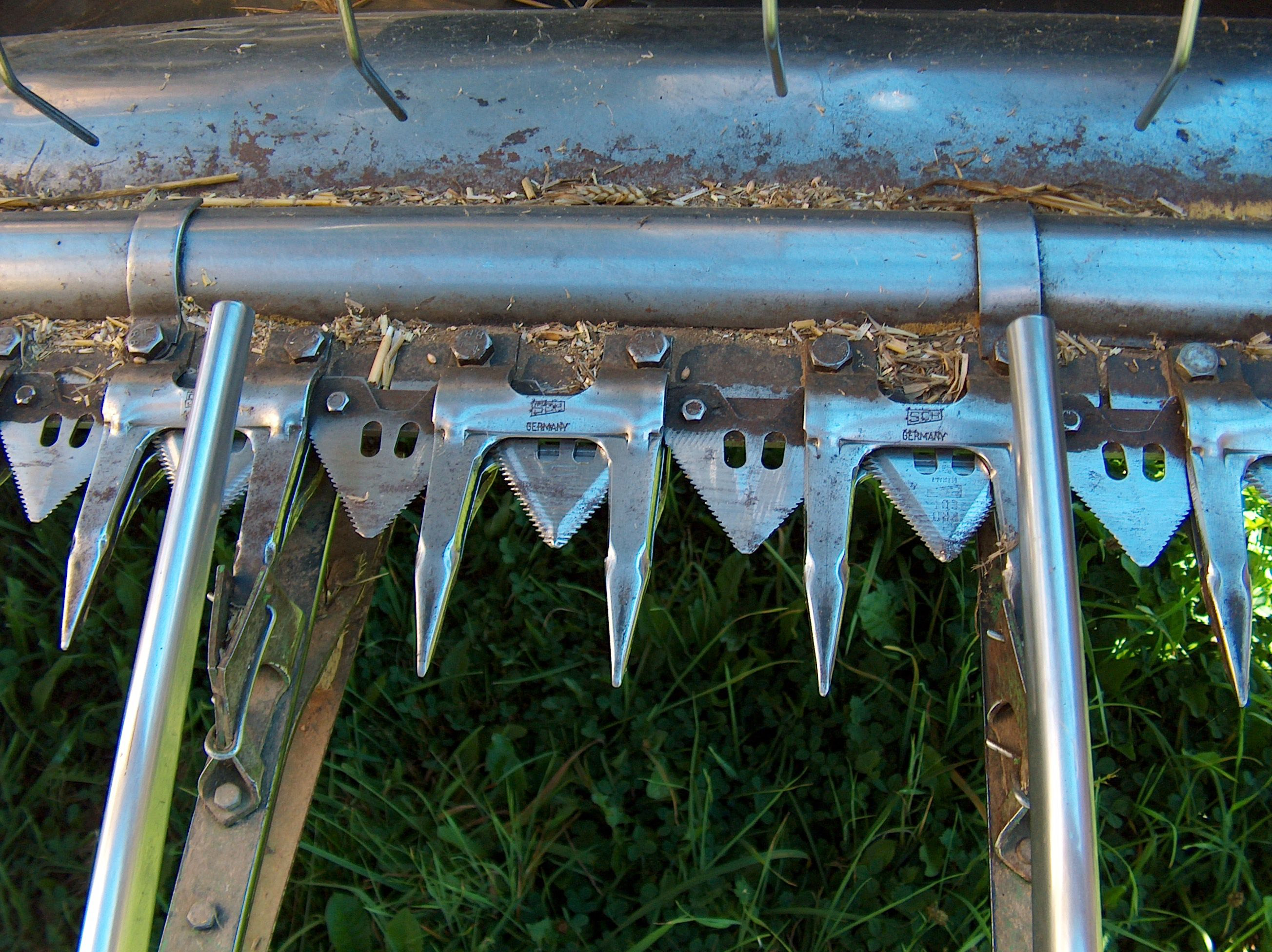 Hochschnittmesserbalken eines New-Holland-Mähdreschers